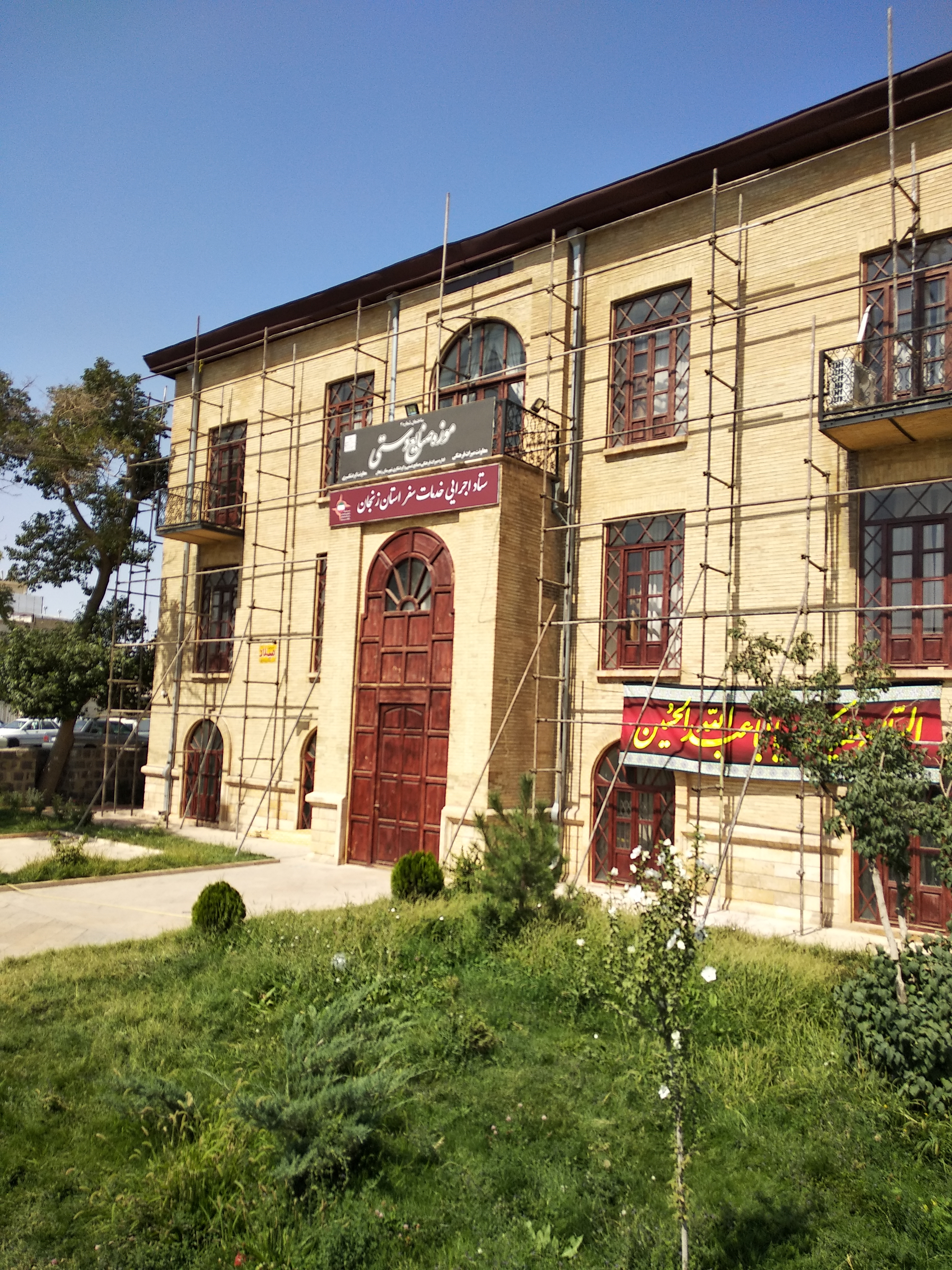 ساختمان دارائی (بنا و باغ)